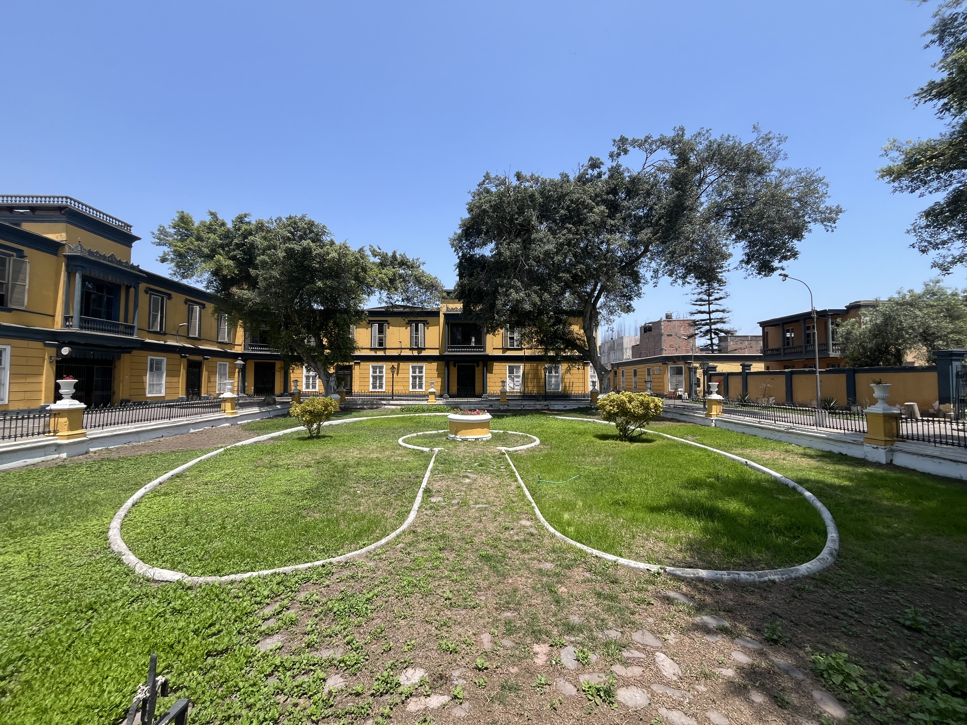 Plaza principal de la Quinta Heeren. Foto: Fabi Garces